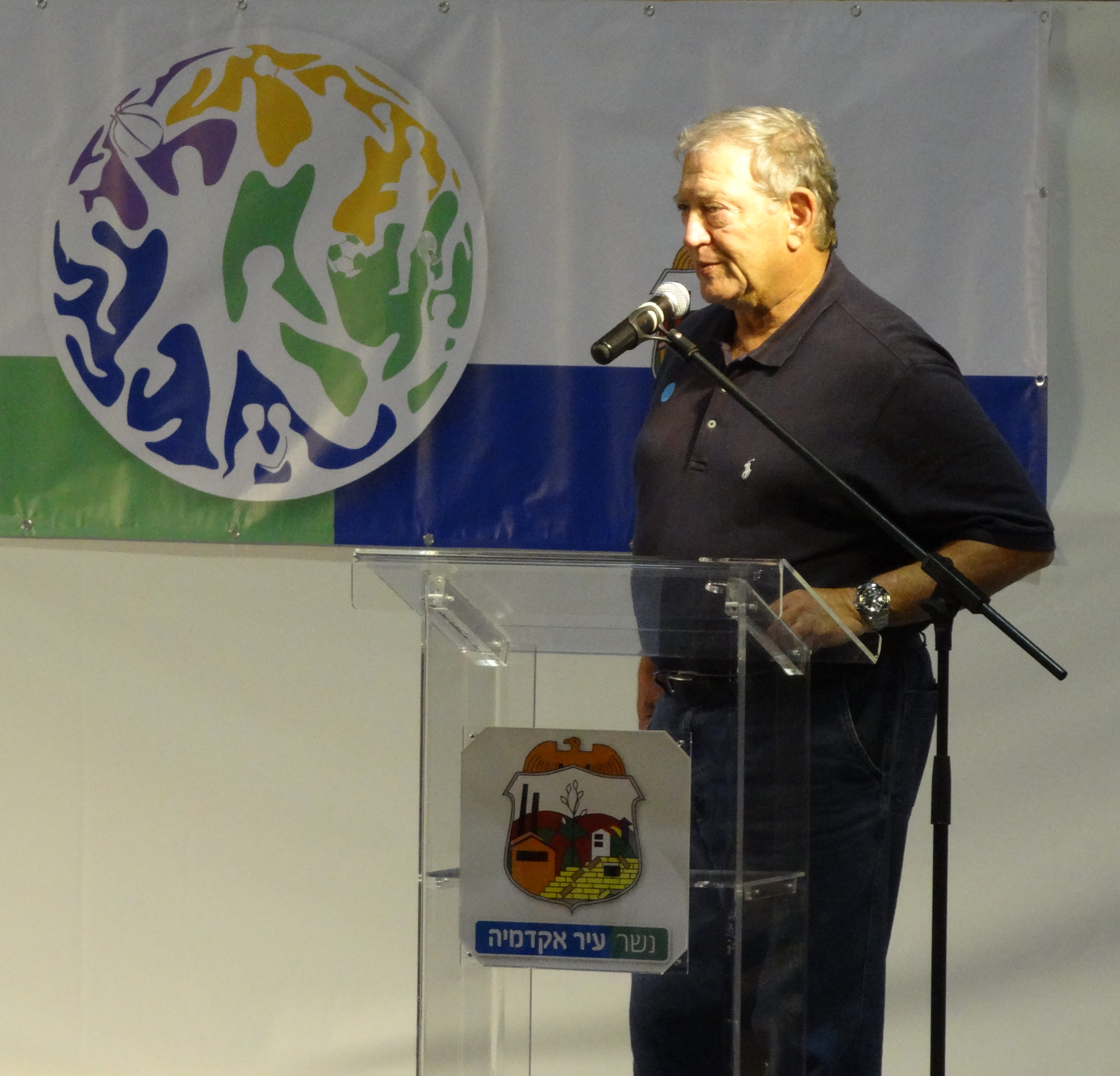 איתמר צ'יזיק הוא מנכ"ל מועדון הכדורגל הישראלי מכבי חיפה מ-2002. התמונות צולמו העת אירוע הצדעה לספורטאים ולספורט בנשר לציון עונת 2014-2013